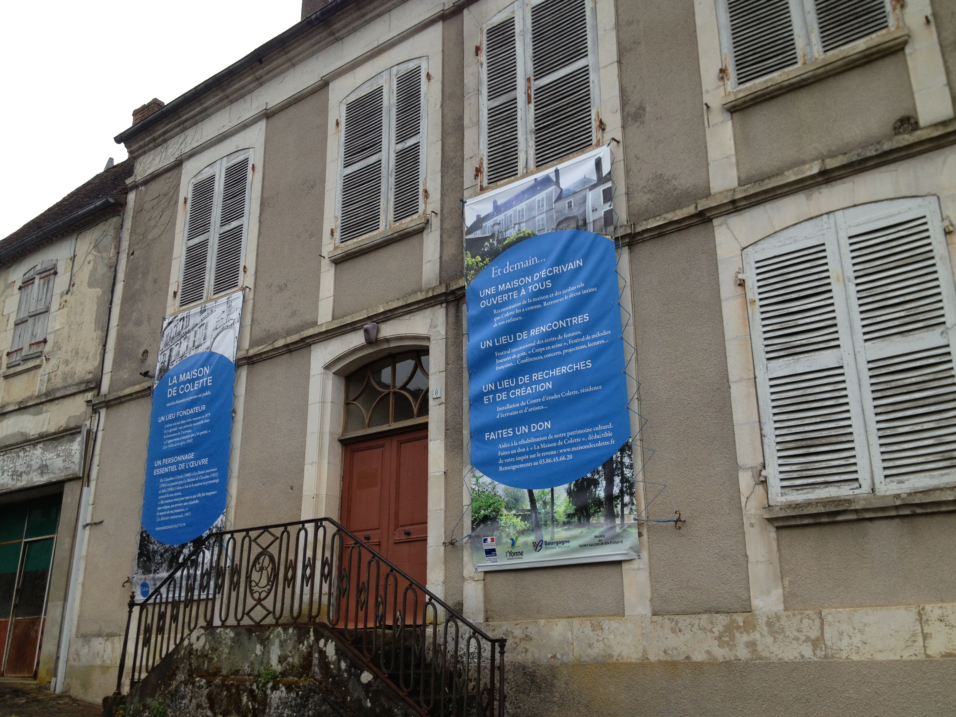 Maison natale de Colette en avril 2011.